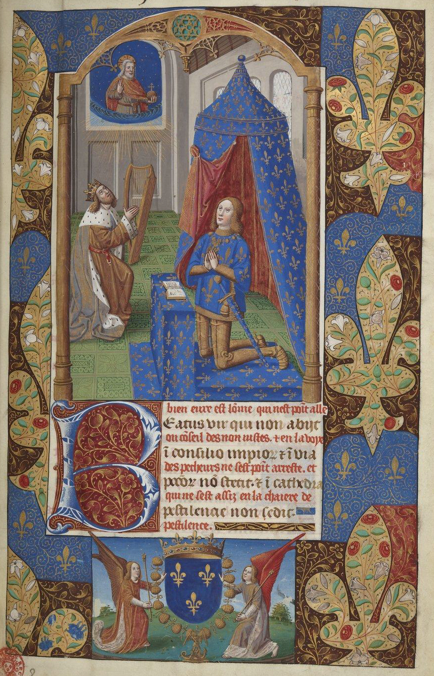 Psalterium Caroli VIII regis, Bibliothèque nationale de France, Paris, MS lat. 774, fol. 1r